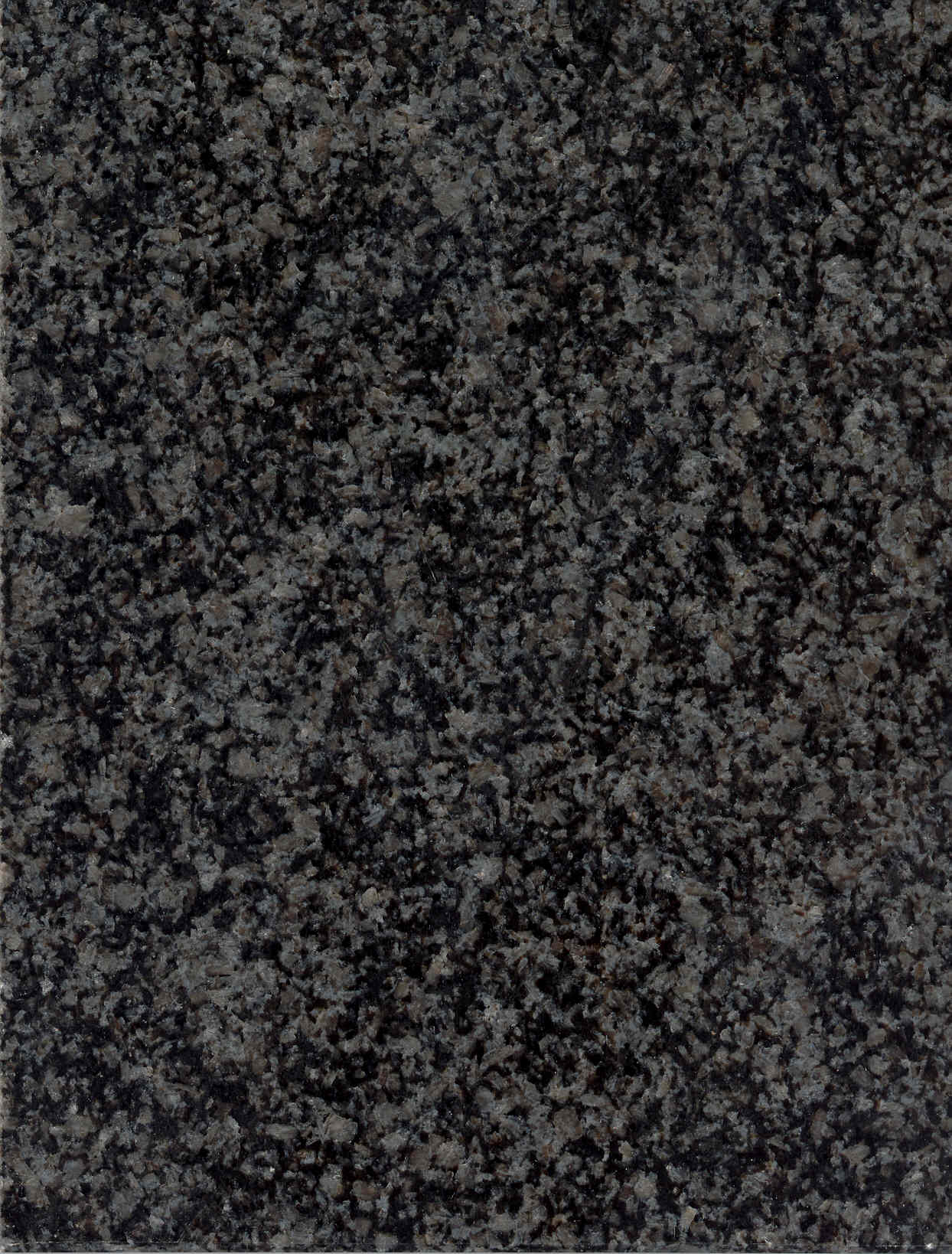 Impala